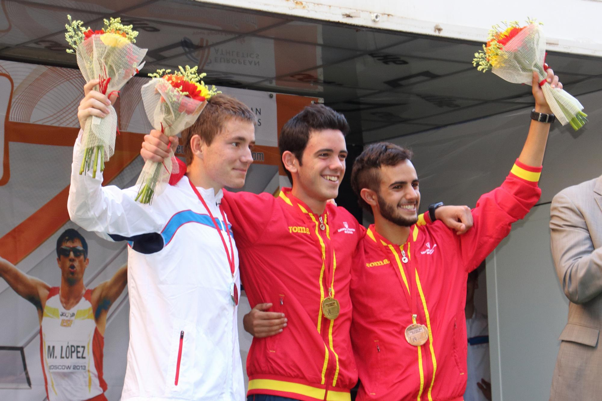 Diego García Carrera en el podio de la Copa de Europa de Marcha Atlética, celebrada en Murcia el 17 de mayo de 2015.